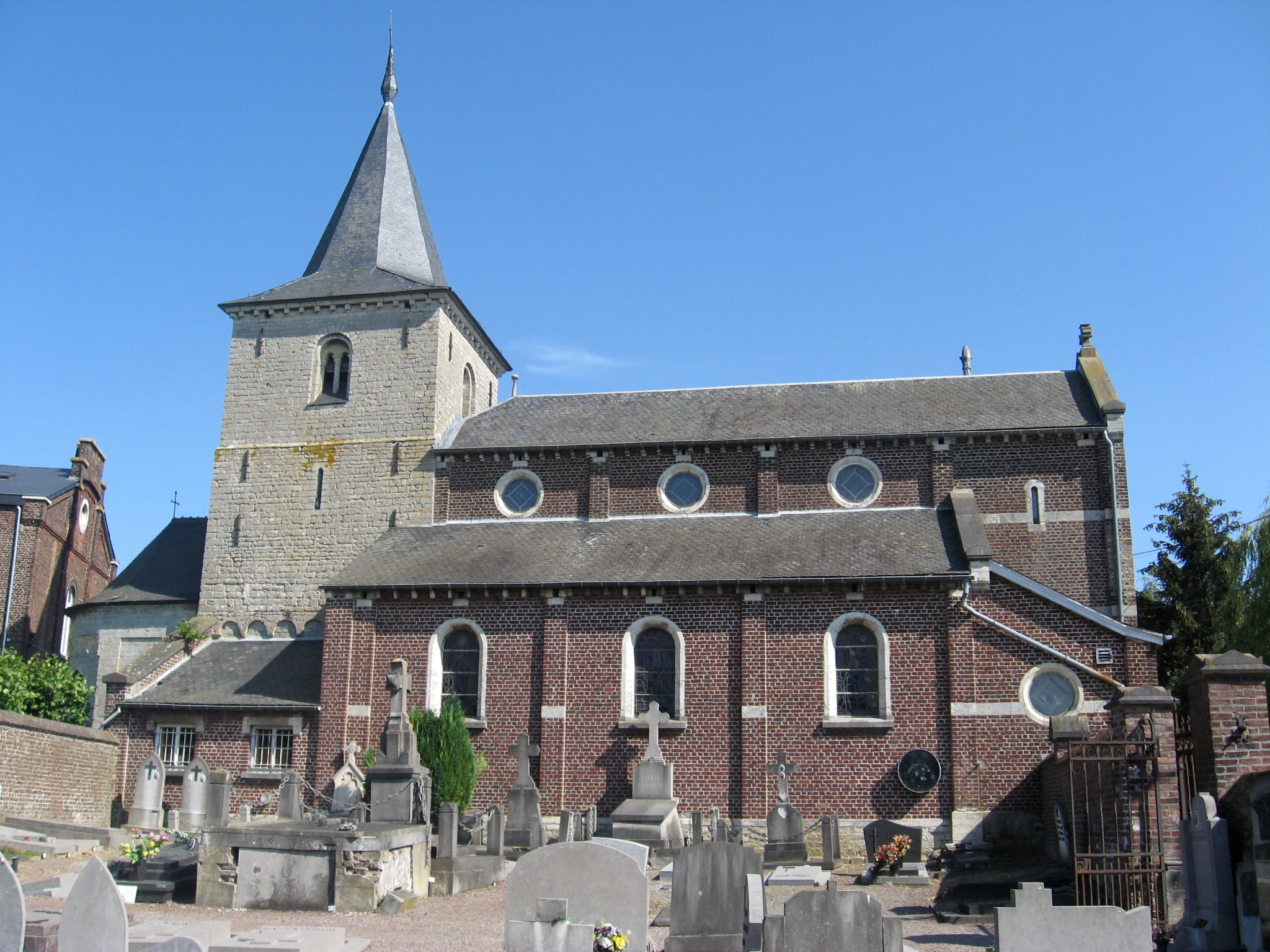 Sint-Pieterskerk in Sainte-Marie-Geest, Sint-Jans-Geest